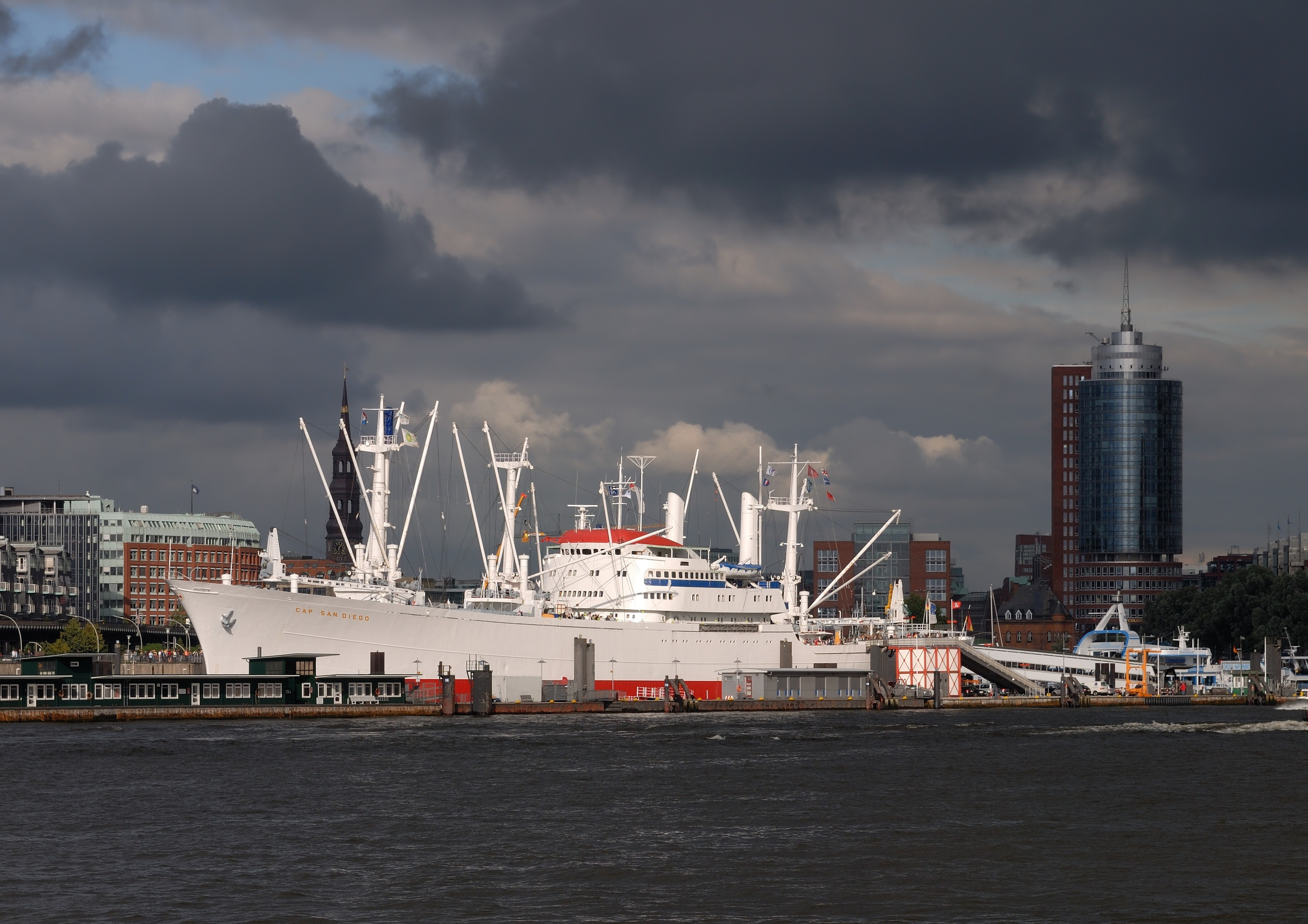 Museumsschiff Cap San Diego, Überseebrücken, HamburgThis is a photograph of an architectural monument.